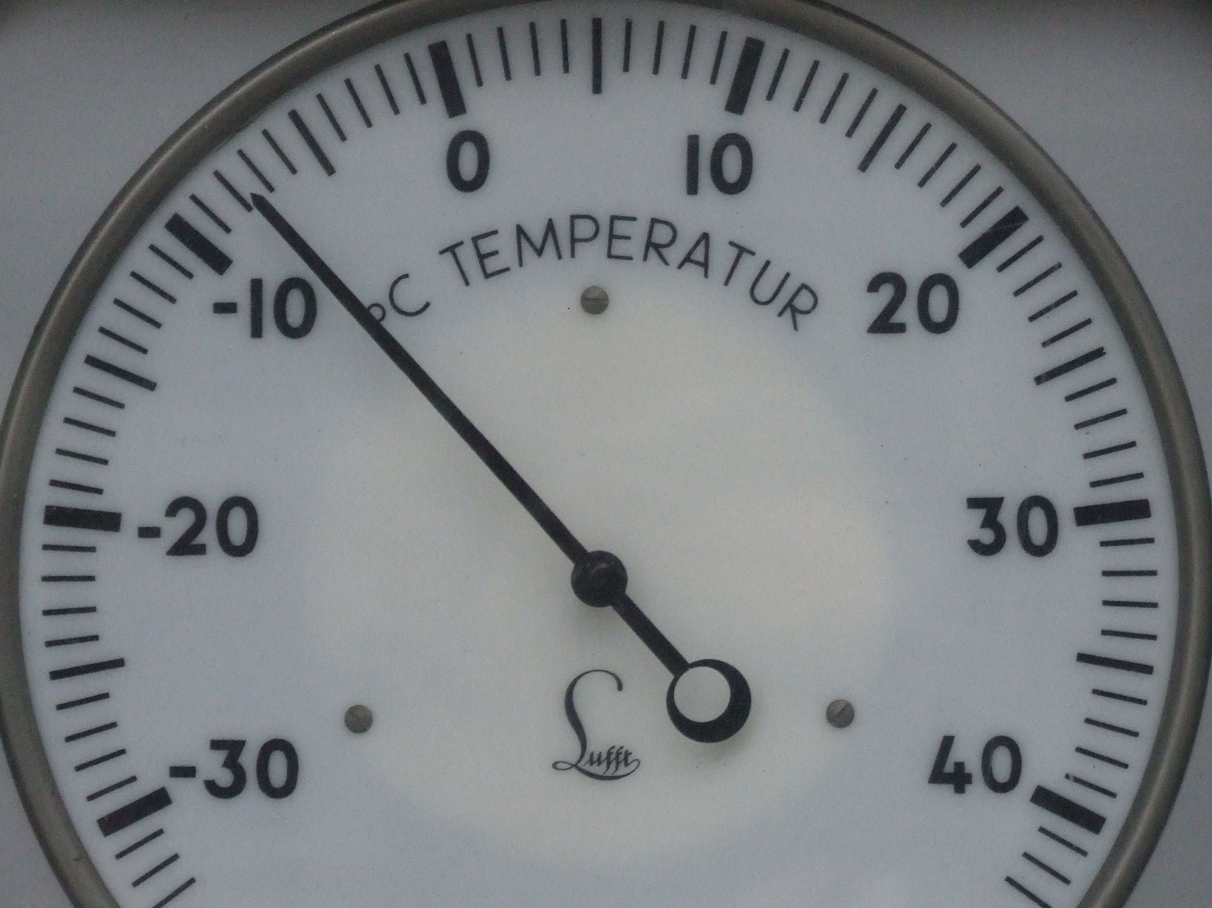 Thermometer winterliche Temperaturen Dezember